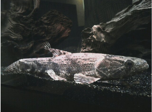 en acuario